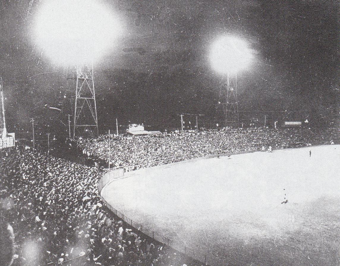 1954年6月2日、平和台野球場最初のナイトゲーム。